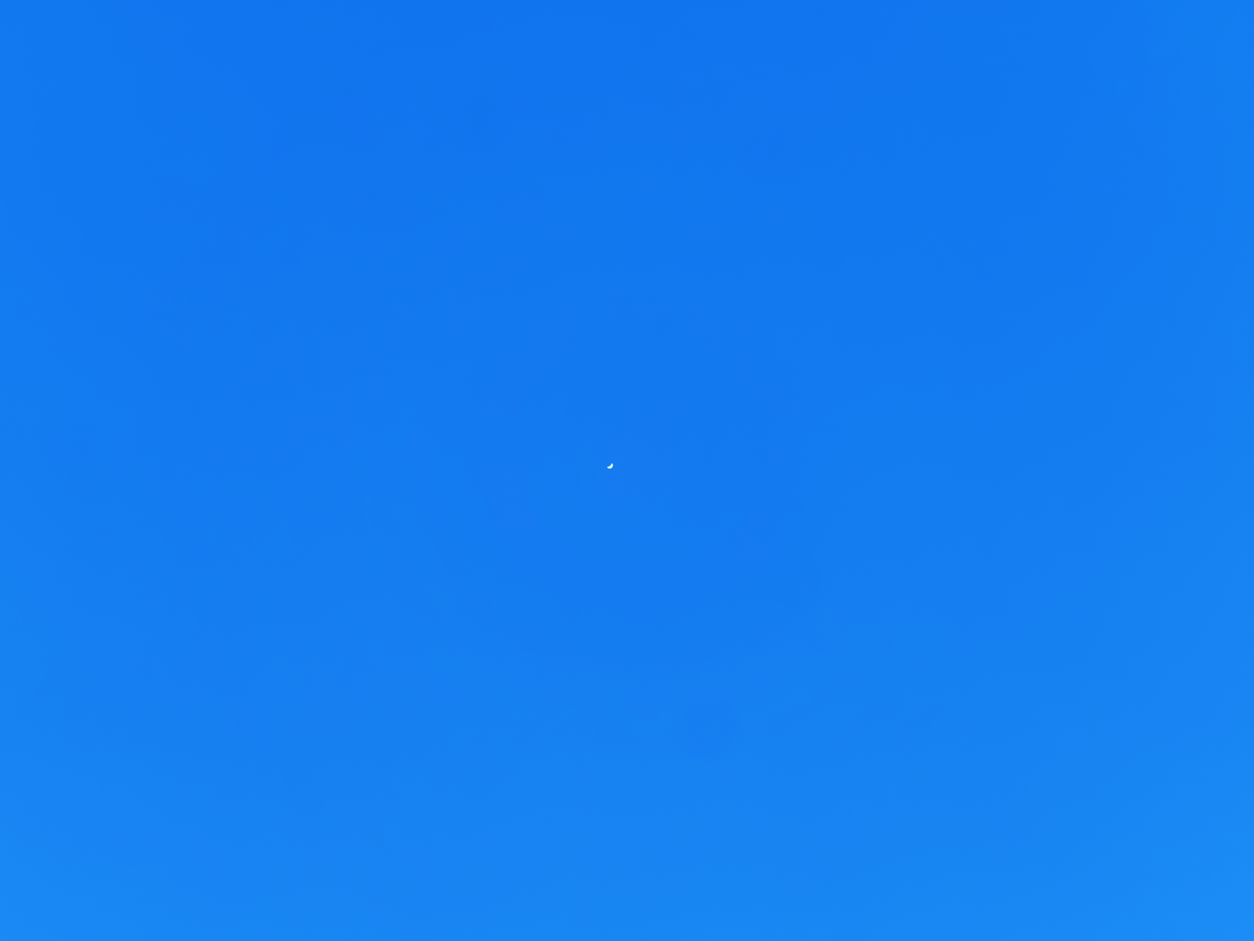 Venussichel im größten Glanz (-4,4m, Horizonthöhe 30,9°, Winkeldurchmesser = 0,7') am westlichen Himmel eine Viertelstunde vor Sonnenuntergang (Horizonthöhe 1,7°), Abstand zur Erde = 0,4 Astronomische Einheiten. Bildhöhe rund 1,9°.